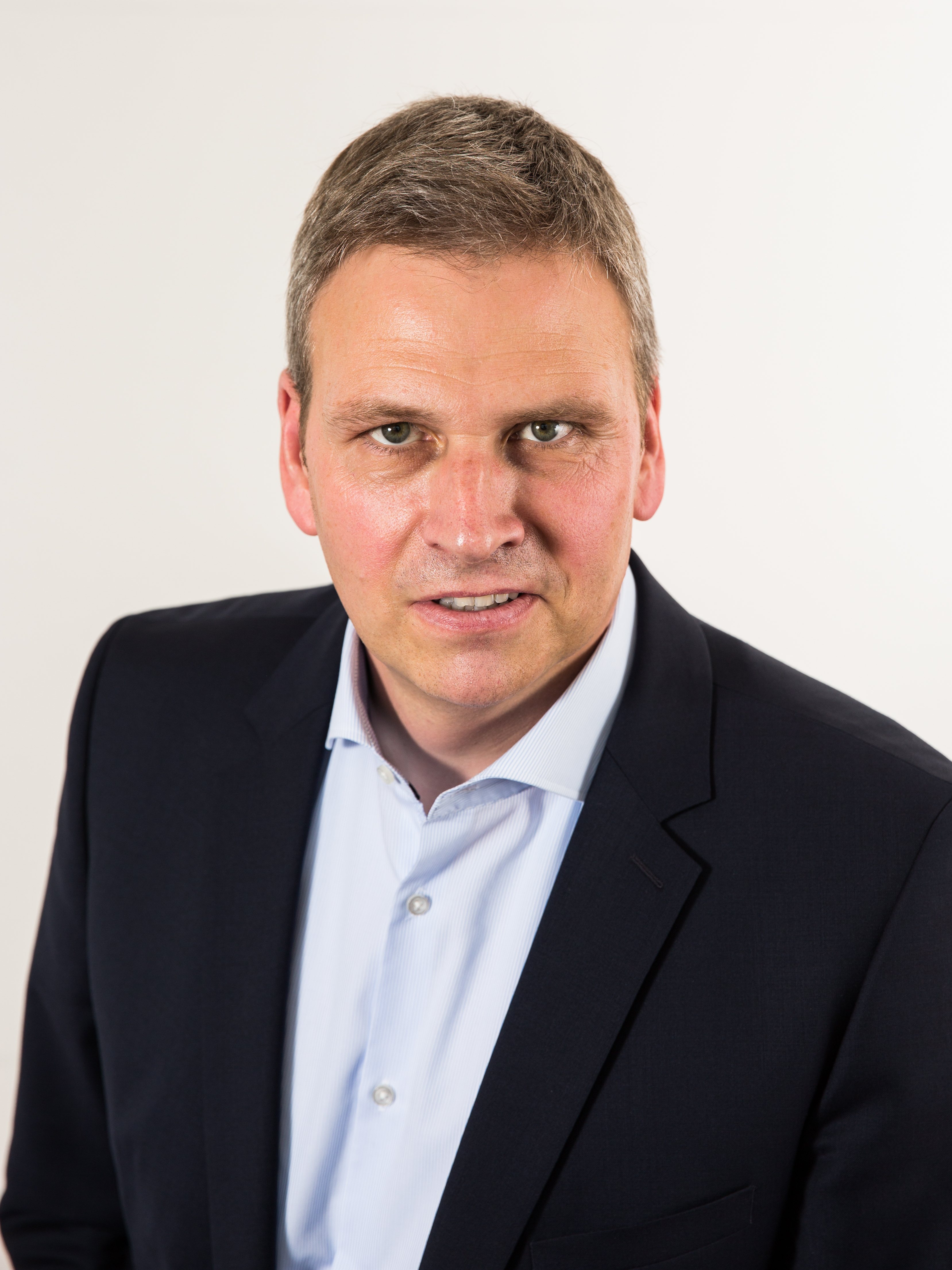 Der saarländische Landtagsabgeordnete Peter Strobel